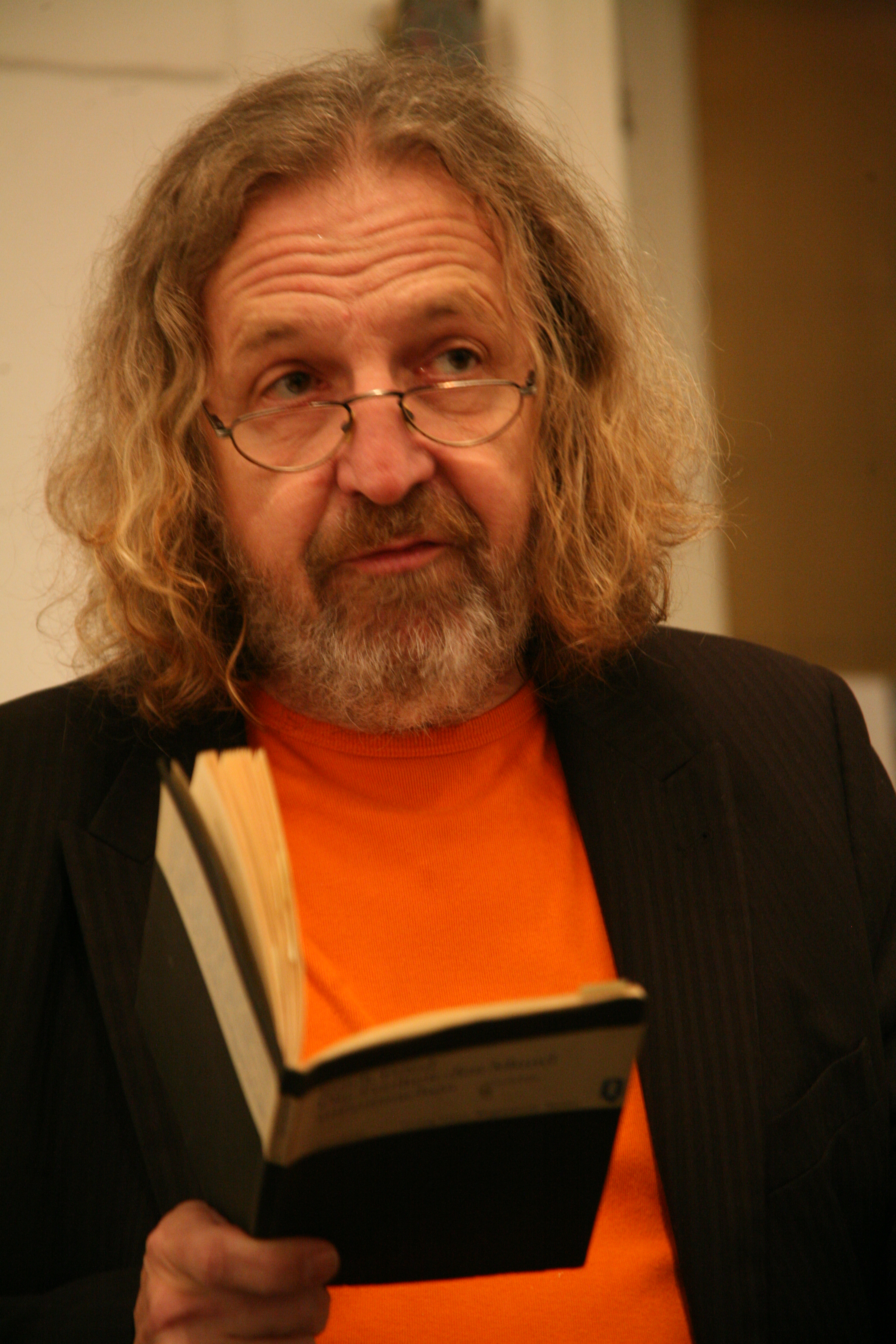 Portraitfoto des Autors Manfred Chobot (2008) - Fotograf: Wladimir Fried